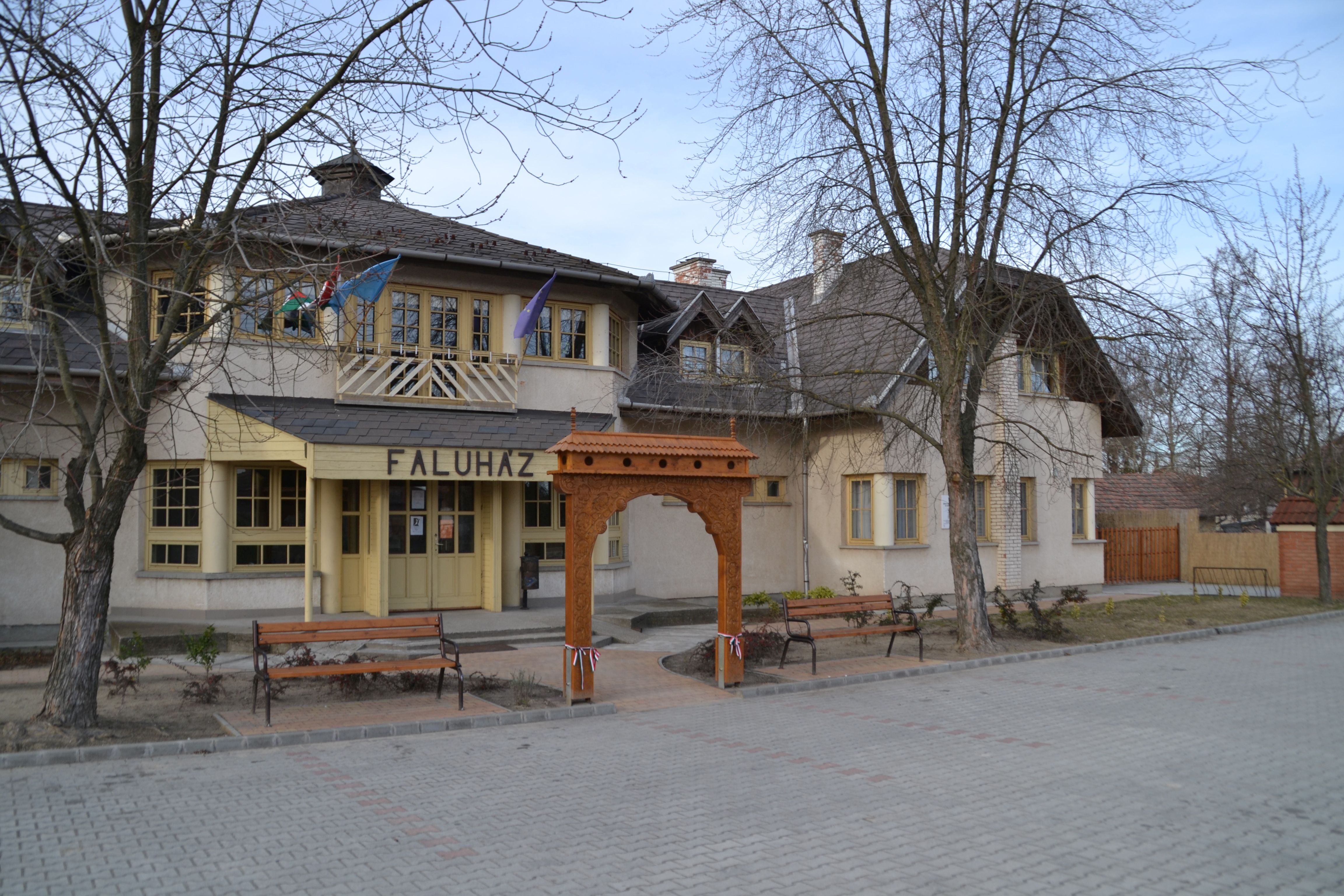 Ballószög